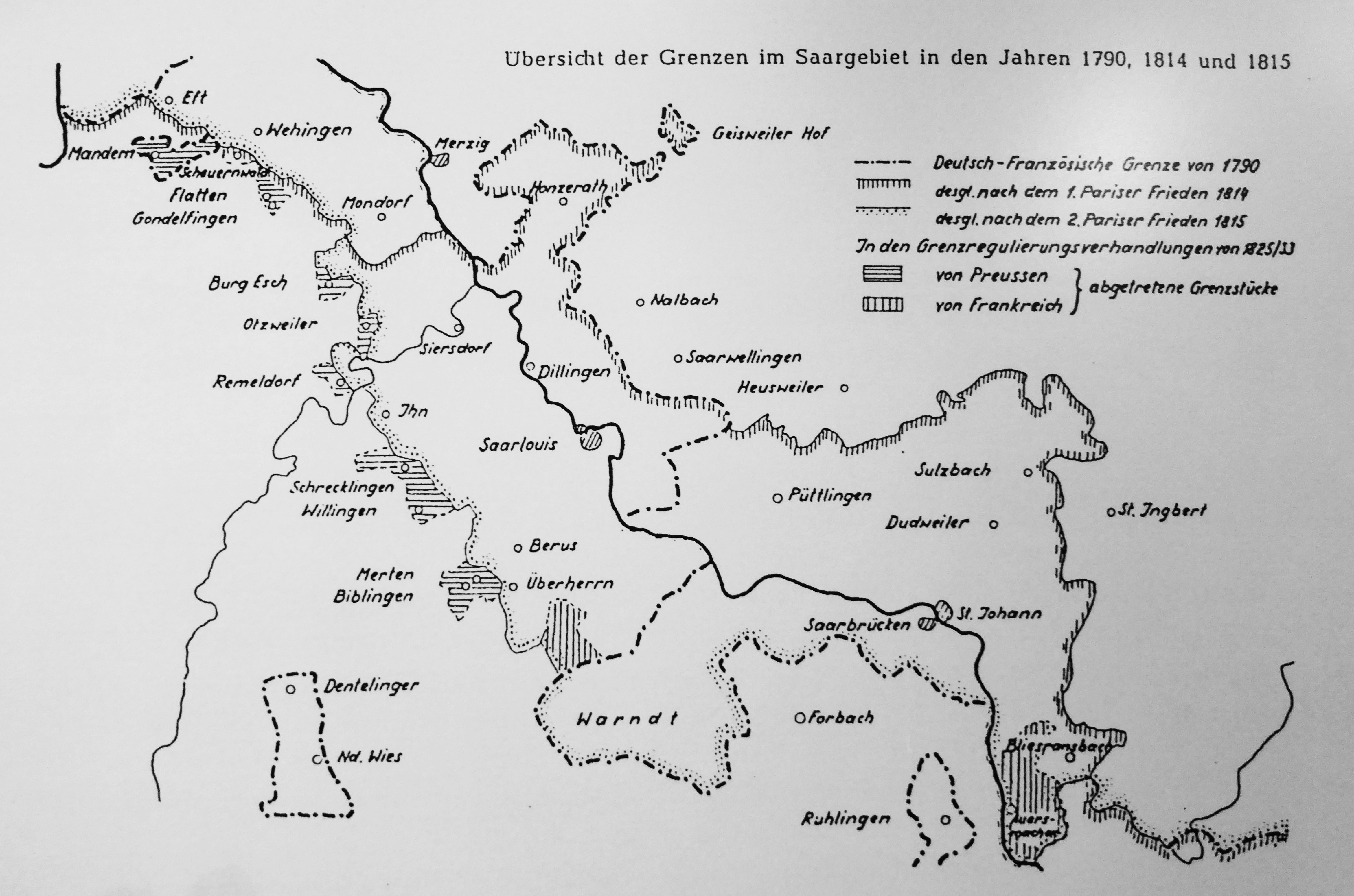 Historische Grenzziehungen im Saartal (Grafik: Verein für Heimatforschung Wallerfangen)